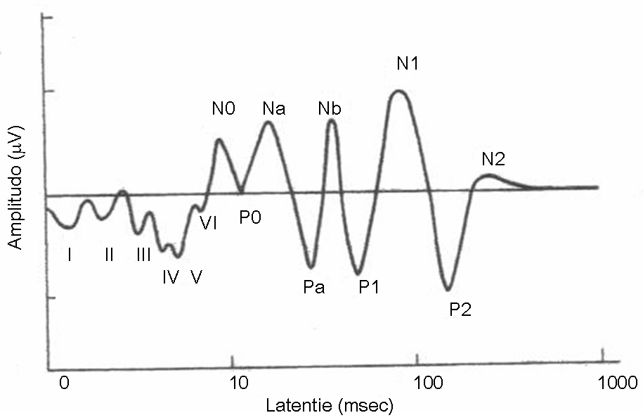 Brainstem potentials